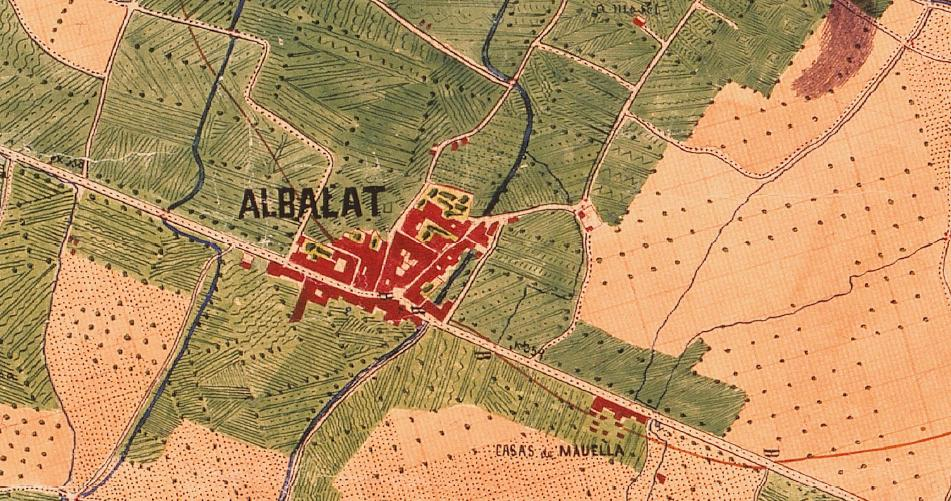 Albalat dels Sorells el 1883 (el nord està a la dreta).